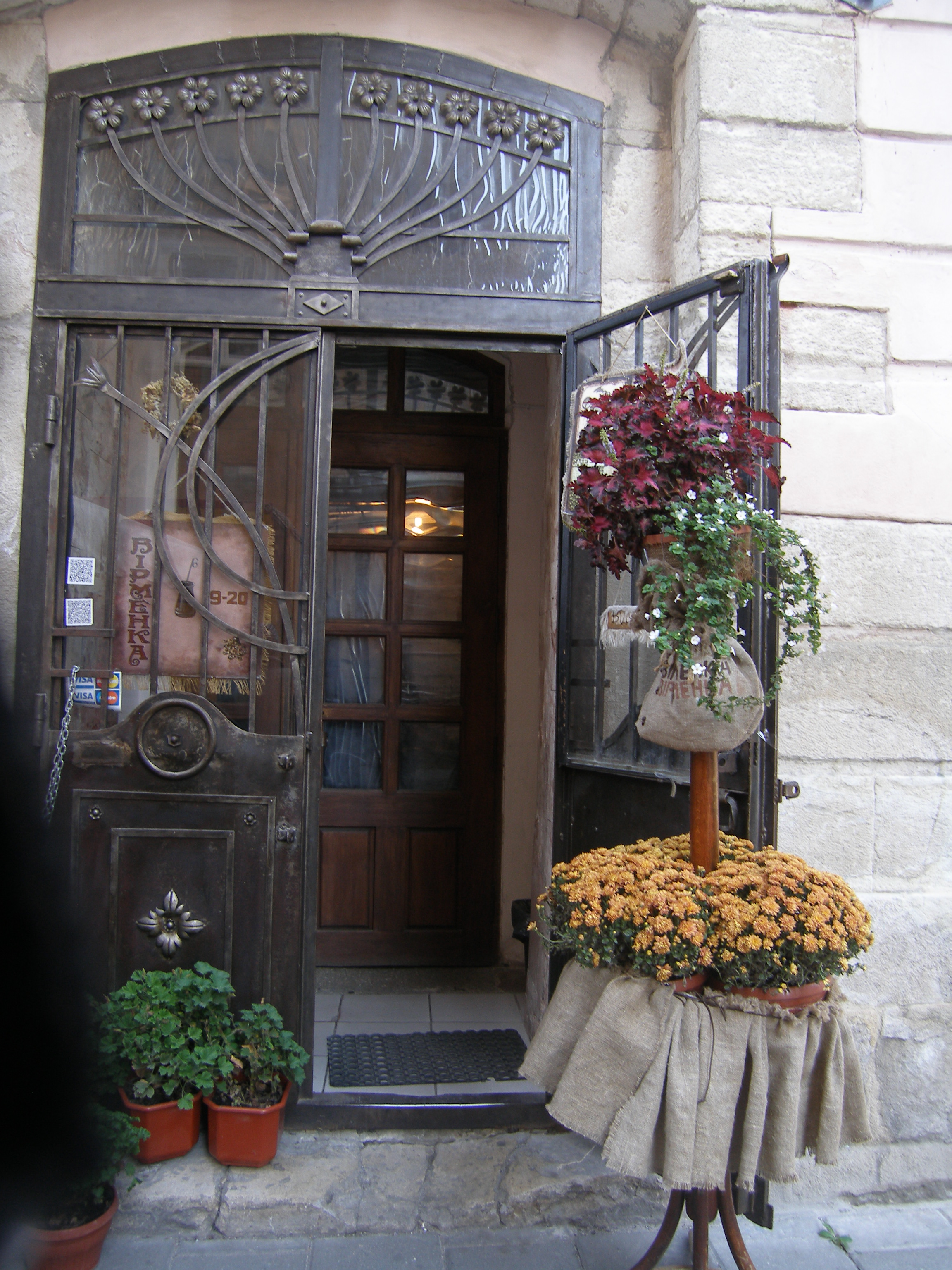 житловий будинок, Львів, Вірменська, 19